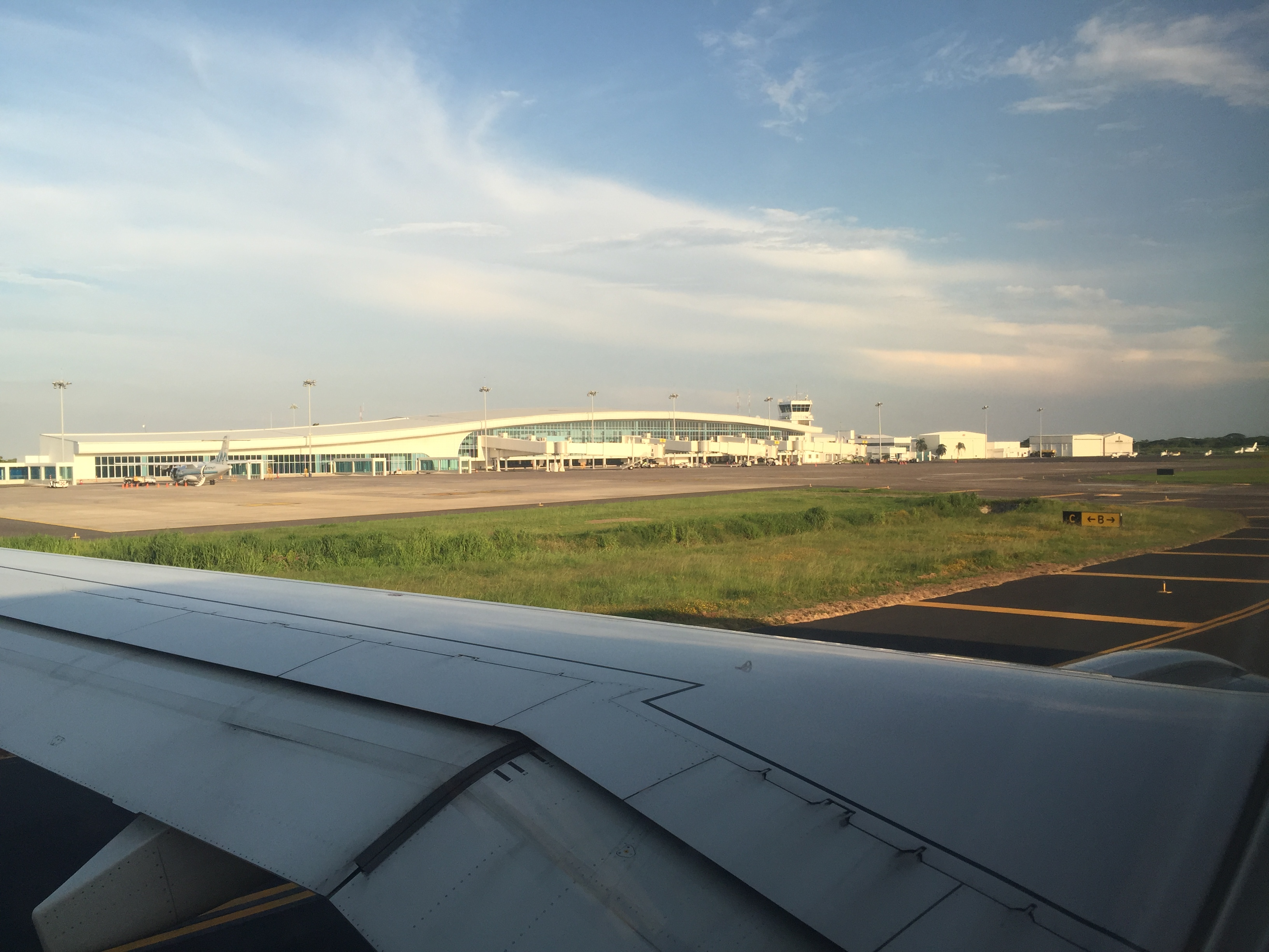 Aeropuerto Internacional de Veracruz.